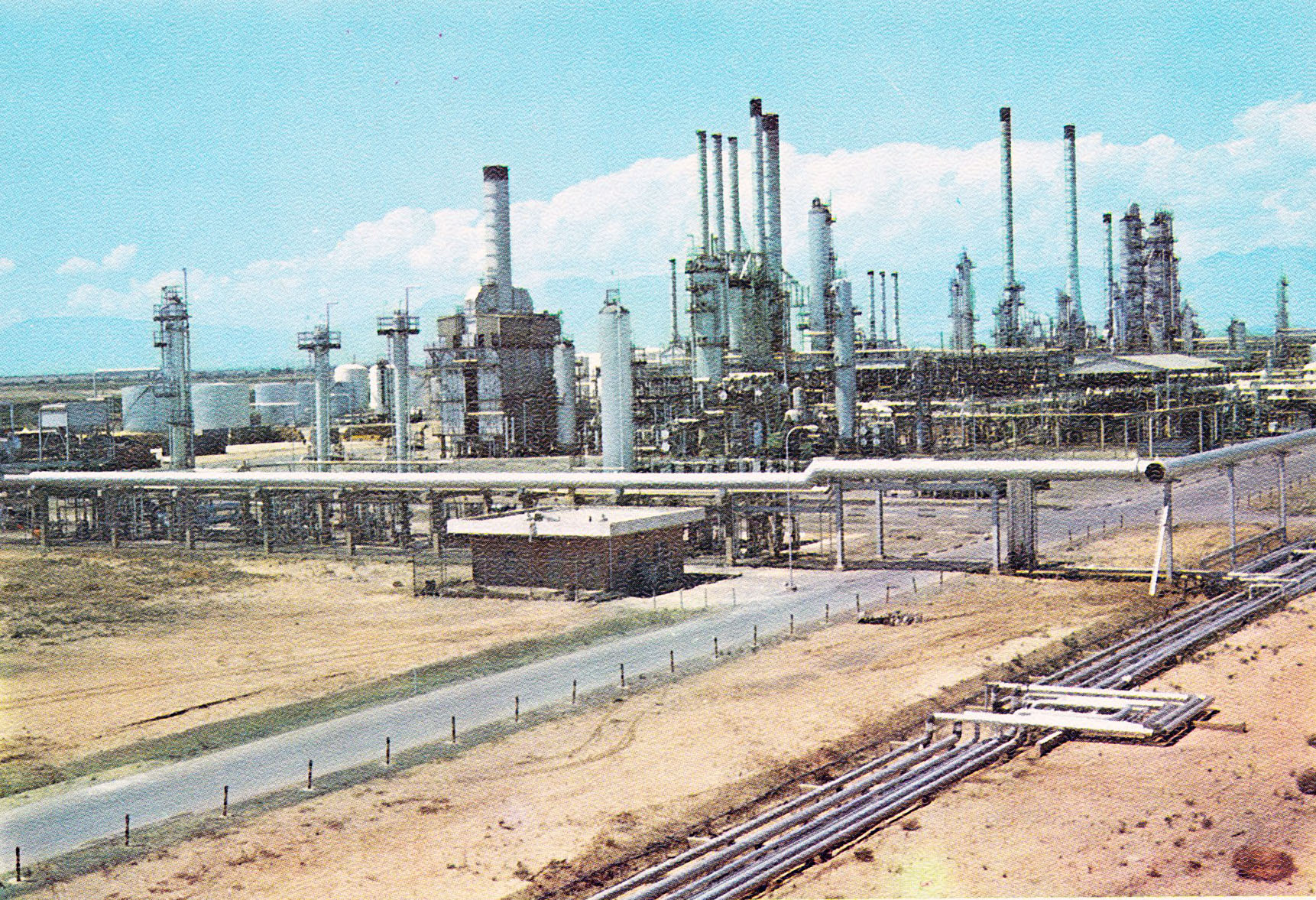 Tehran Oil Refinery